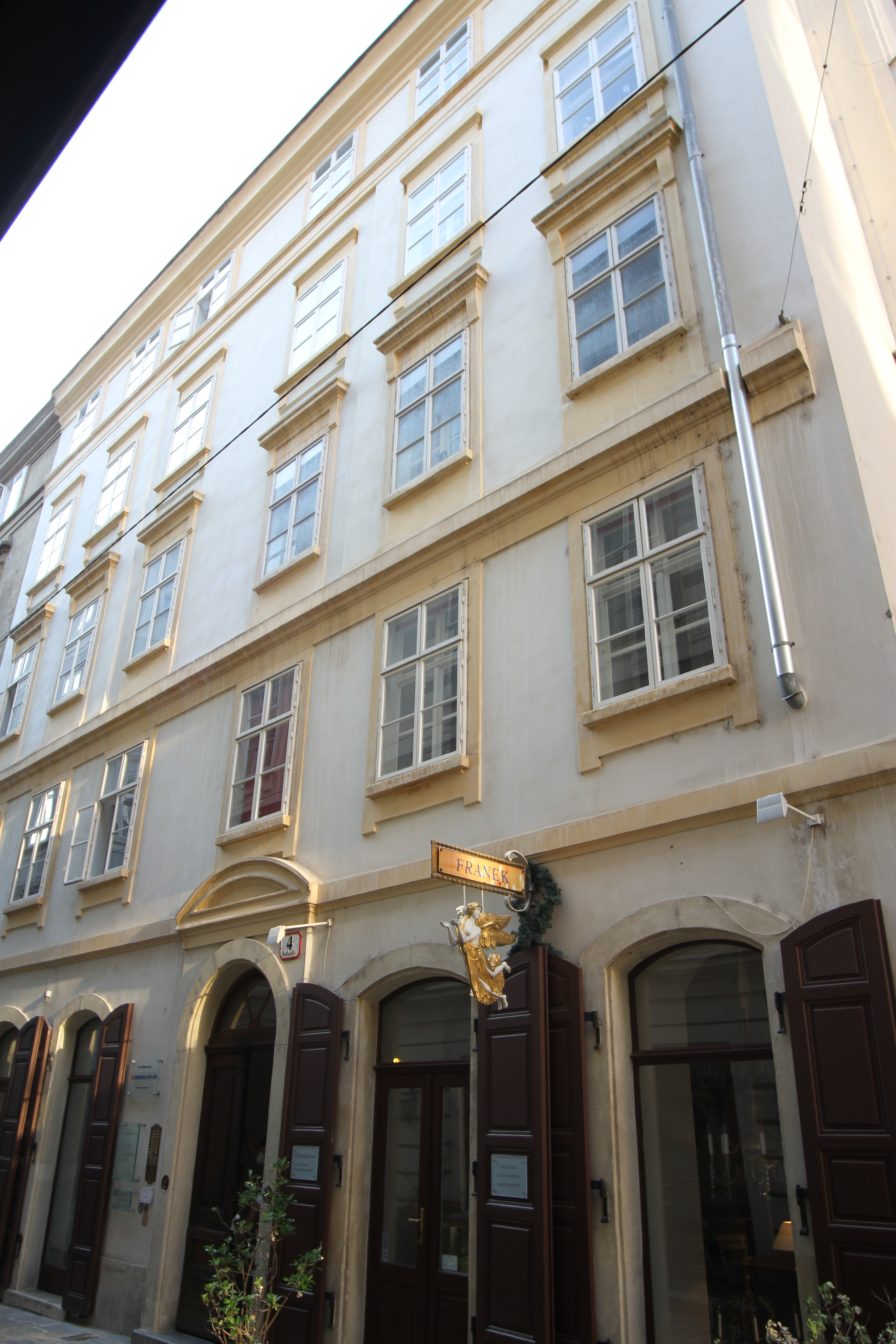 Miethaus, Ballgasse 4, Wien 1. Bezirk.